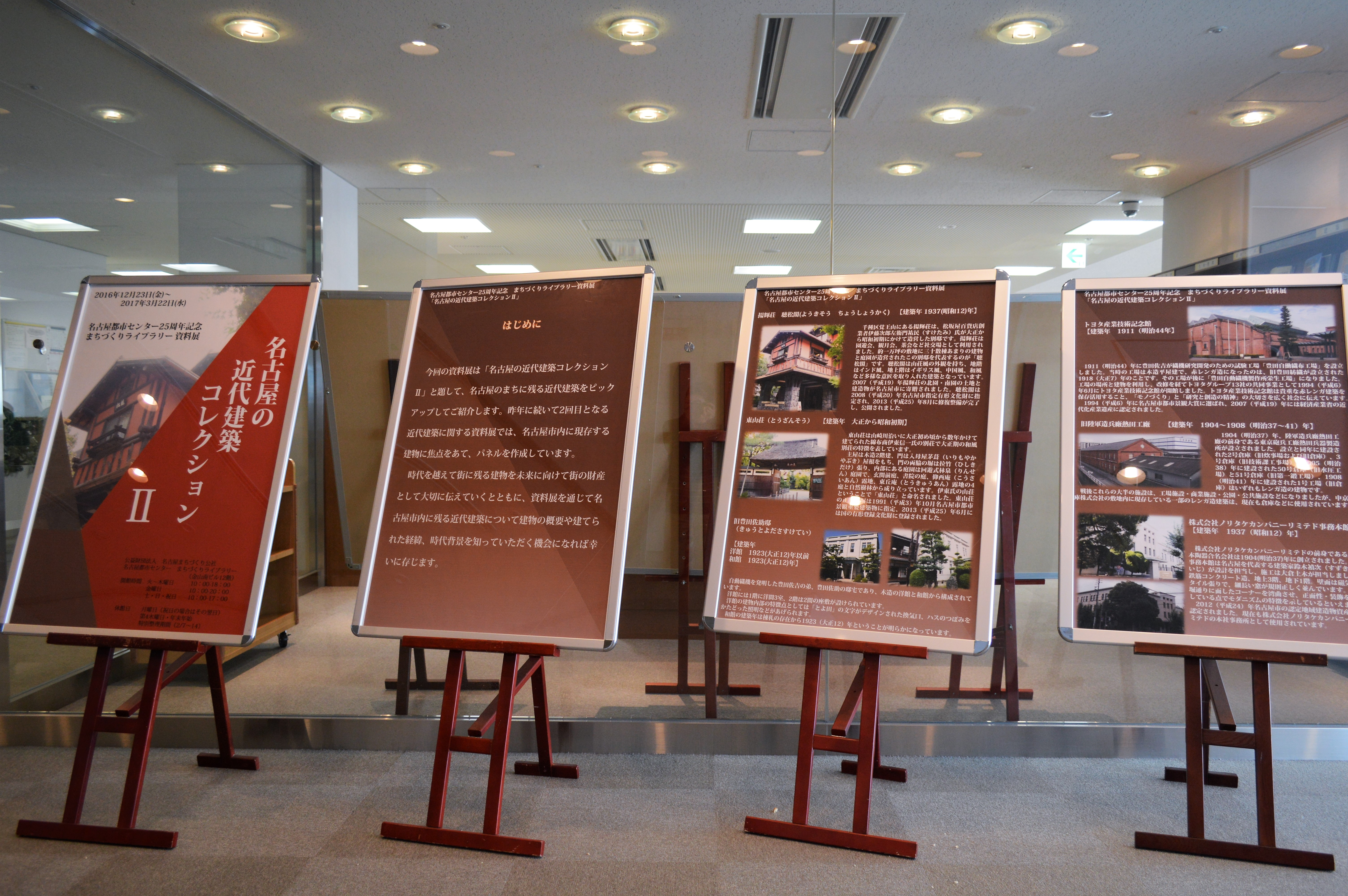 金山南ビル12階にある名古屋都市センターまちづくりライブラリー。